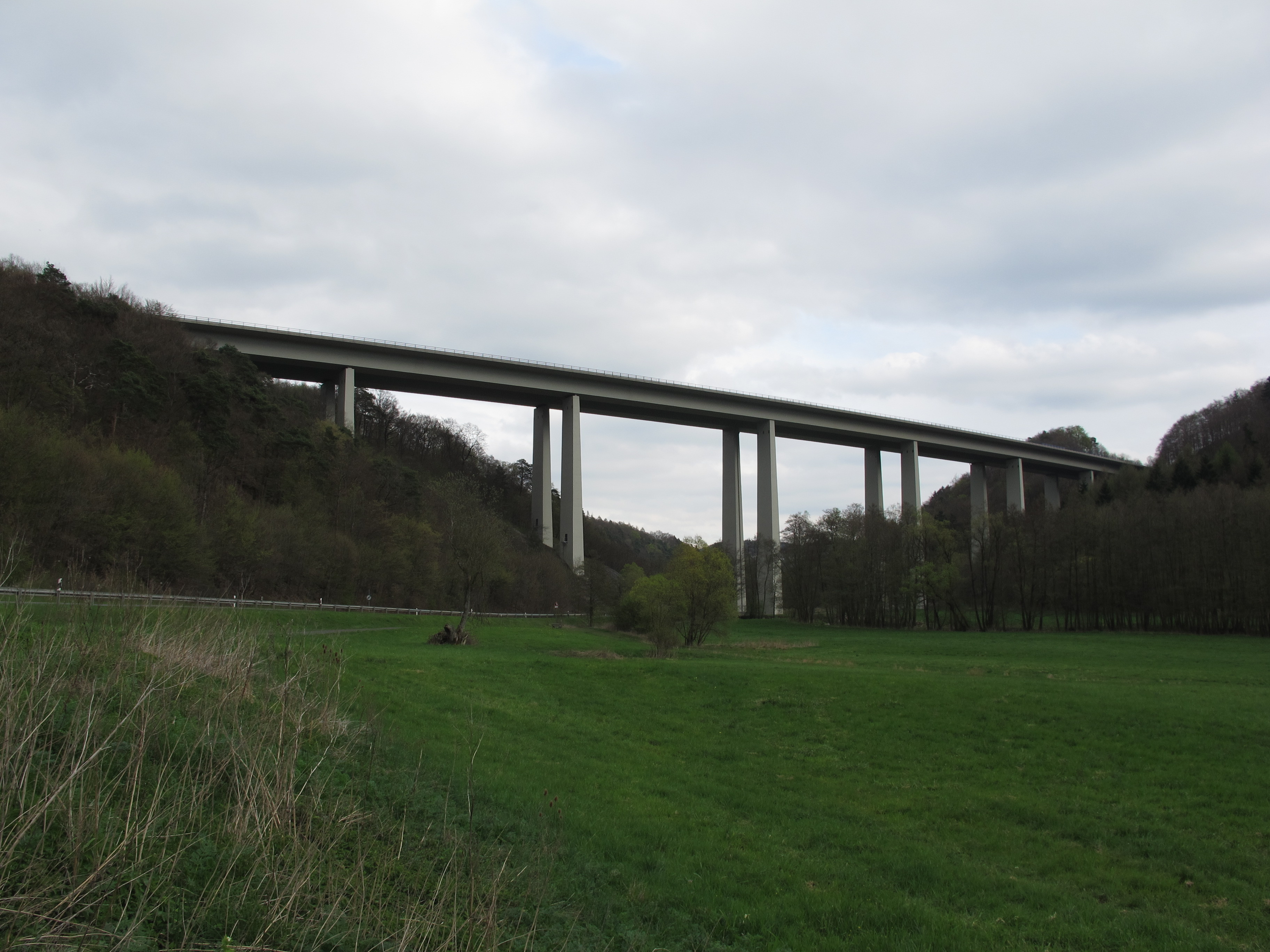 Ambachtalbrücke der A45 bei Herborn.